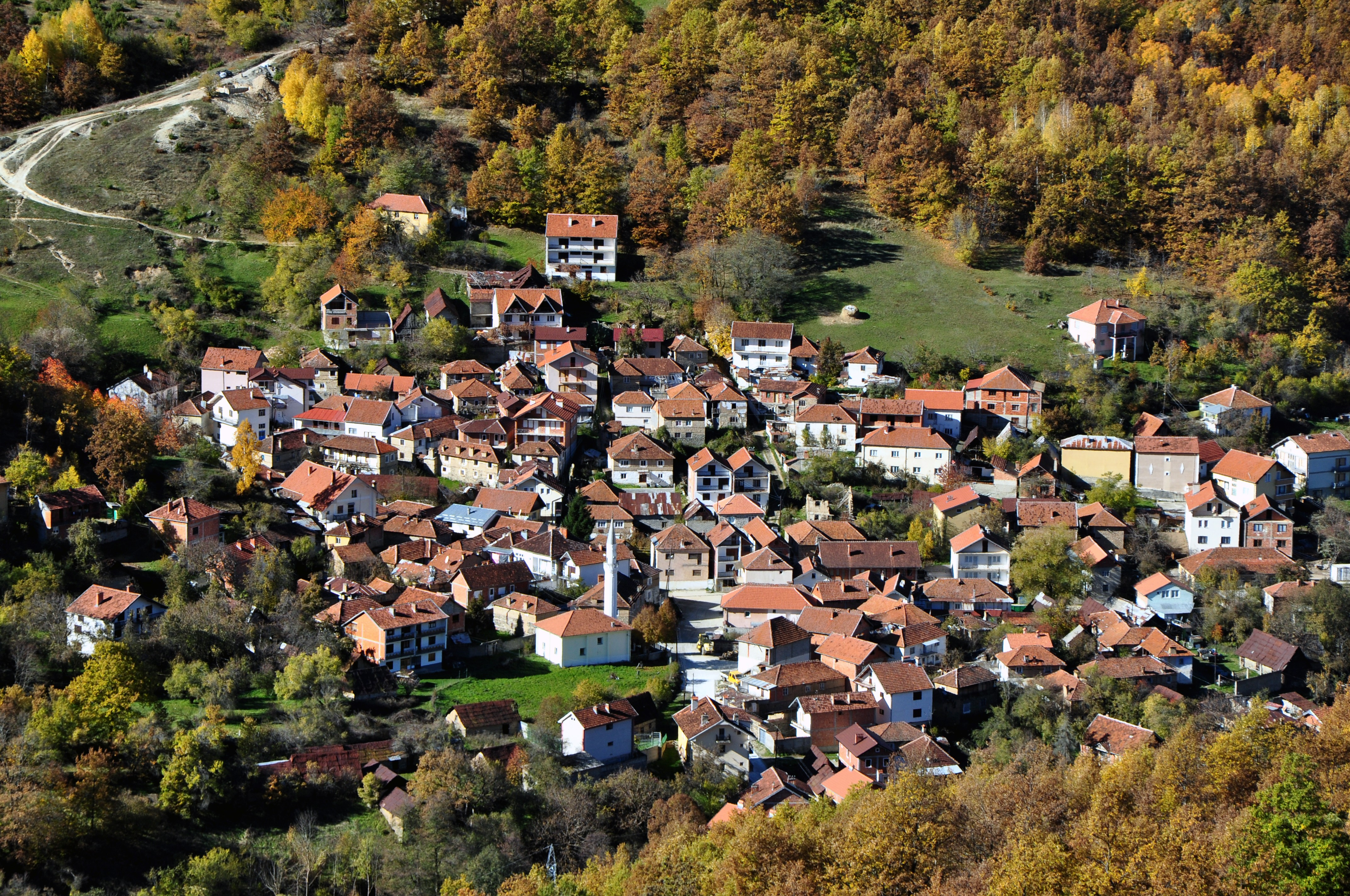 selo Mlike, Dragaš